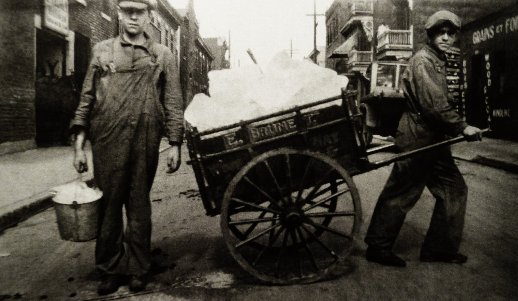 Livreurs de glace à Saint-Henri, Montréal (Québec, Canada). Avant l'arrivée du réfrigérateur on taillait la glace sur le fleuve et on l'entreposait dans un hangar au frais dans le brin de scie. L'été on la livrait aux résidents comme ici dans ce quartier populaire du Sud-Ouest de Montréal.